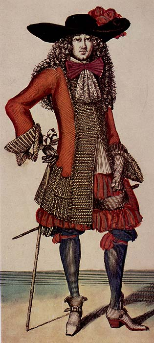 Mann in Justaucorps